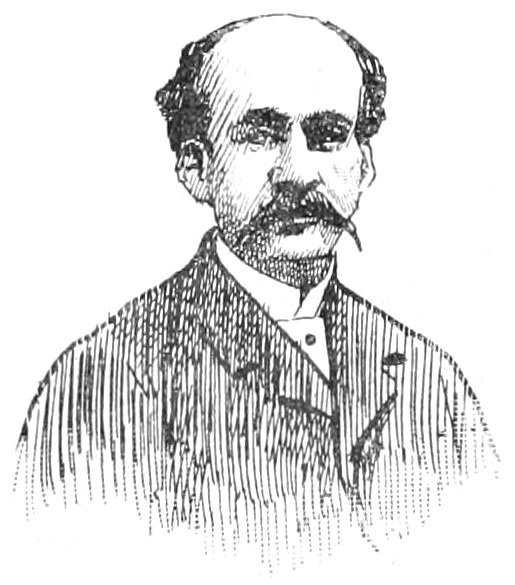 "La Nouvelle Chambre" : "Prax-Paris".